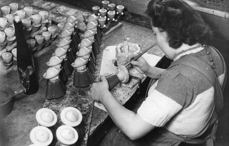 Seiffen, Bemalen von Räuchermännchen Seiffen in Erzgebirge 1947 Schule des Weihnachtsmannes. Bild zeigt: Bemalen von Räuchermännchen Aufnahme: Dumm 989-47